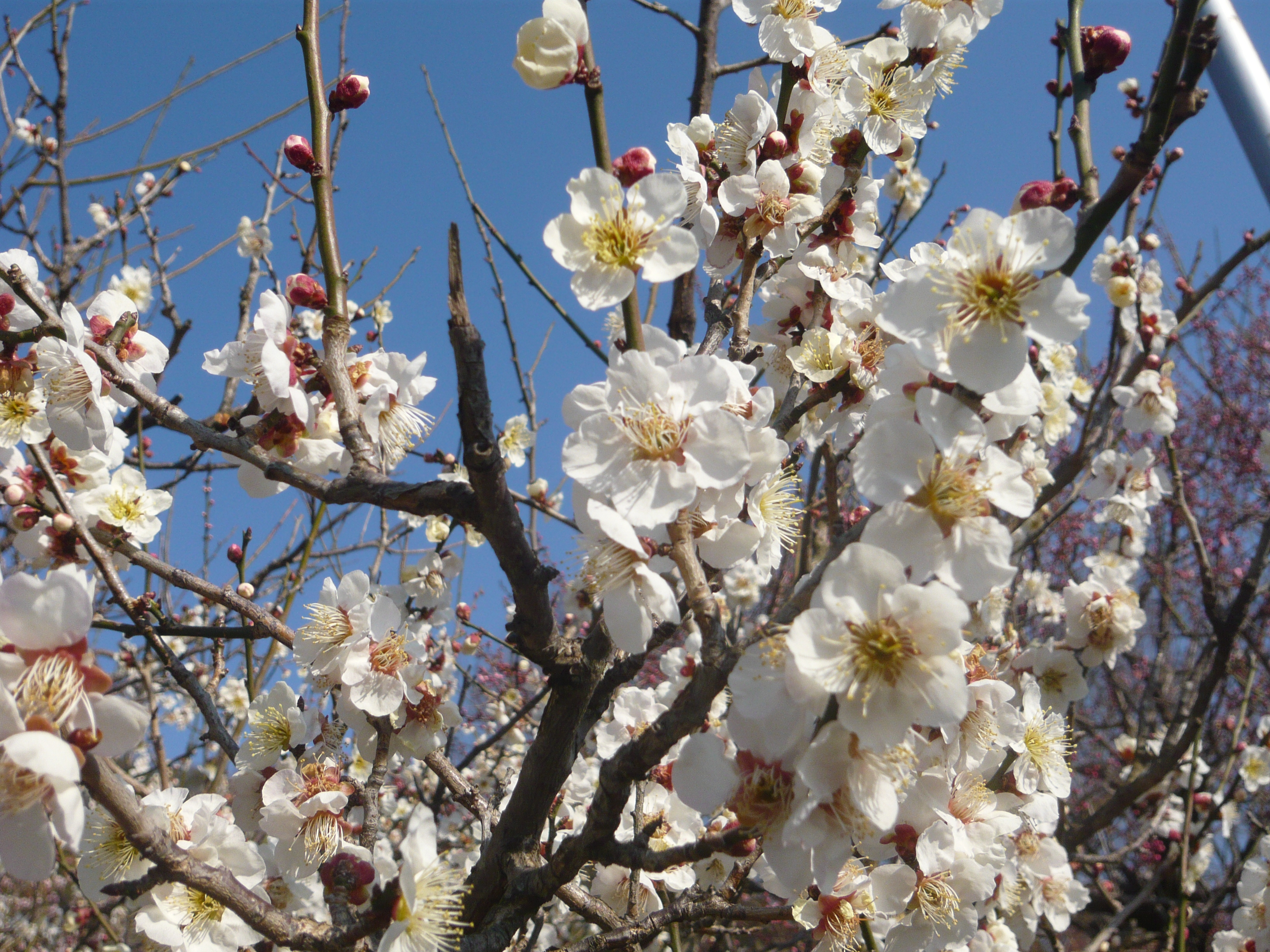 Prunus mume 'Chaseibai' 茶青梅（梅）,Gifu,Gifu,Japan（岐阜県岐阜市のw:ja:梅林公園）で撮影。